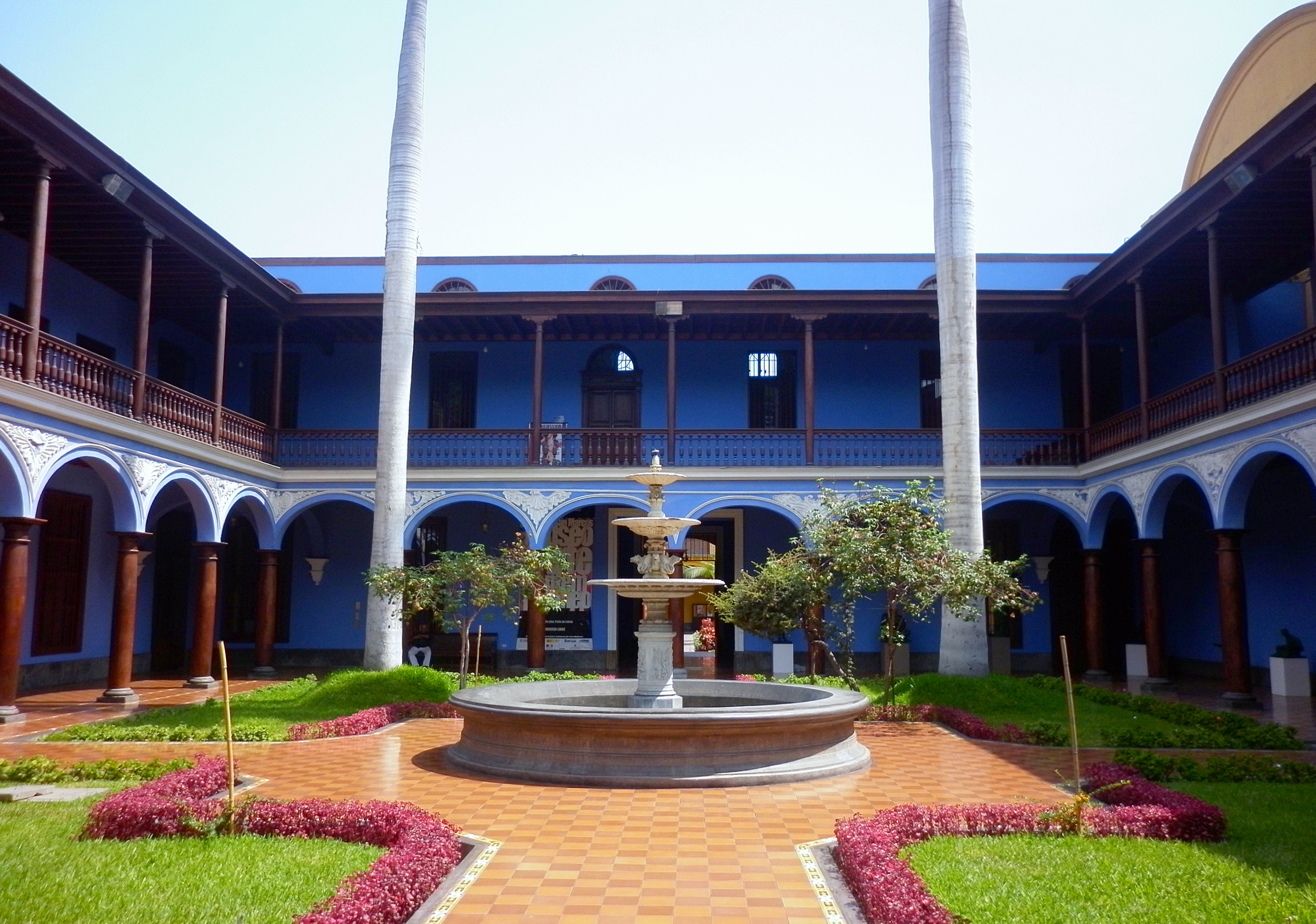 Patio de Derecho de la Casona de la Universidad Nacional Mayor de San Marcos, Lima, Peru.